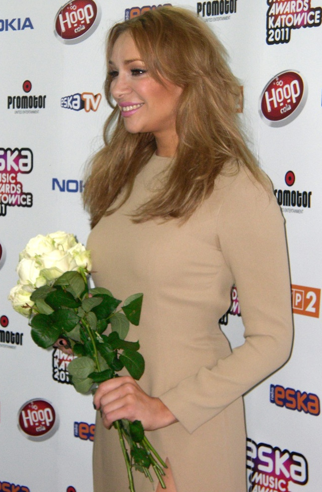 Sonia Bohosiewicz podczas Eska Music Awards w katowickim Spodku, 28 maja 2011